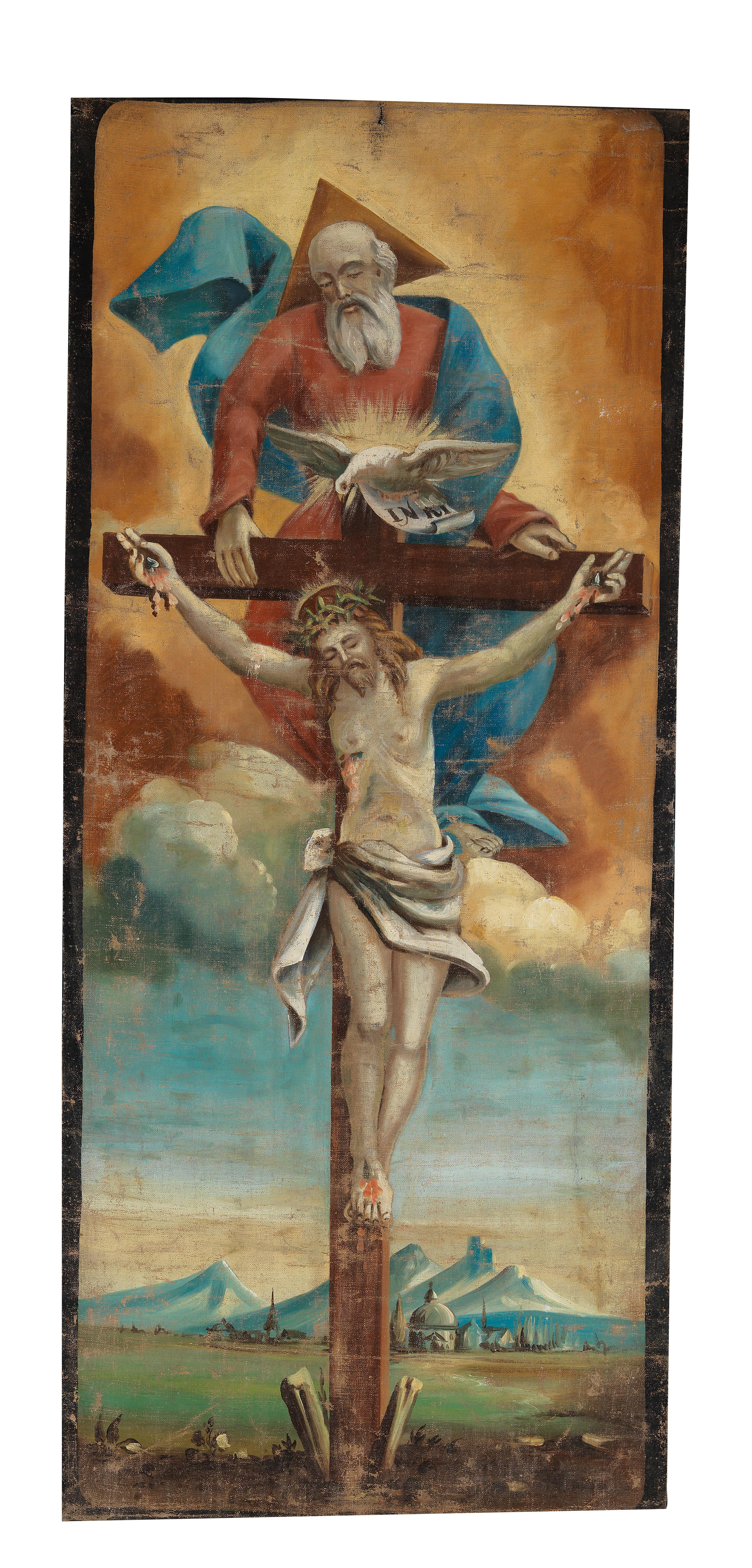 Doppelseitig bemalte Prozessionsfahne mit einer Darstellung des Gnadenstuhls bzw. der Tod mit einer Sanduhr, Öl auf Leinwand, 141 x 60,5 cm, alpenländisch, 18. Jh.; Provenienz: Sammlung Reinhold Hofstätter, Schloss Schwallenbach